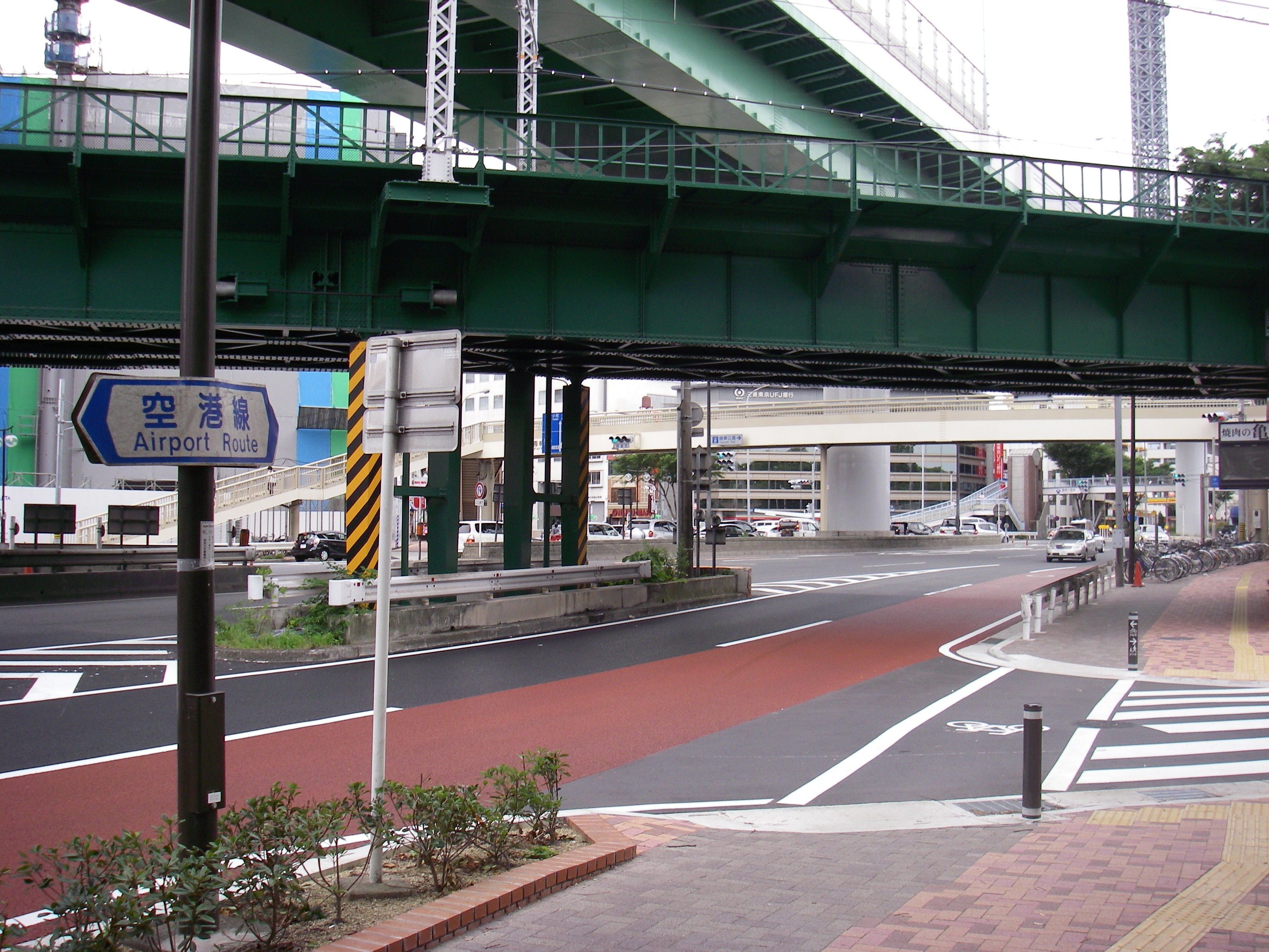 名古屋市道堀田高岳線、名古屋市鶴舞中央図書館付近から鶴舞交差点方向。画面最上部の高架線は名古屋高速都心環状線、その下の鉄橋はJR中央本線。